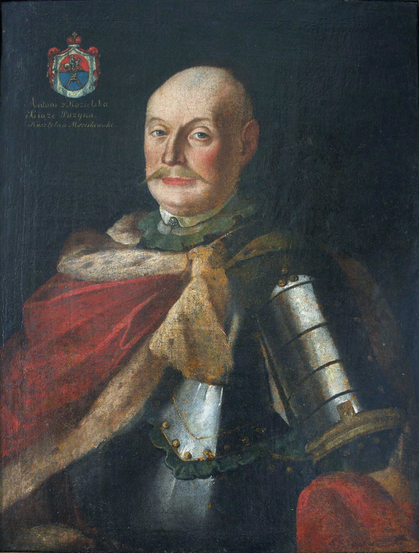 Беларуская (тарашкевіца): Партрэт Антонія Міхала Пузыны (Antoni Michał Puzyna)